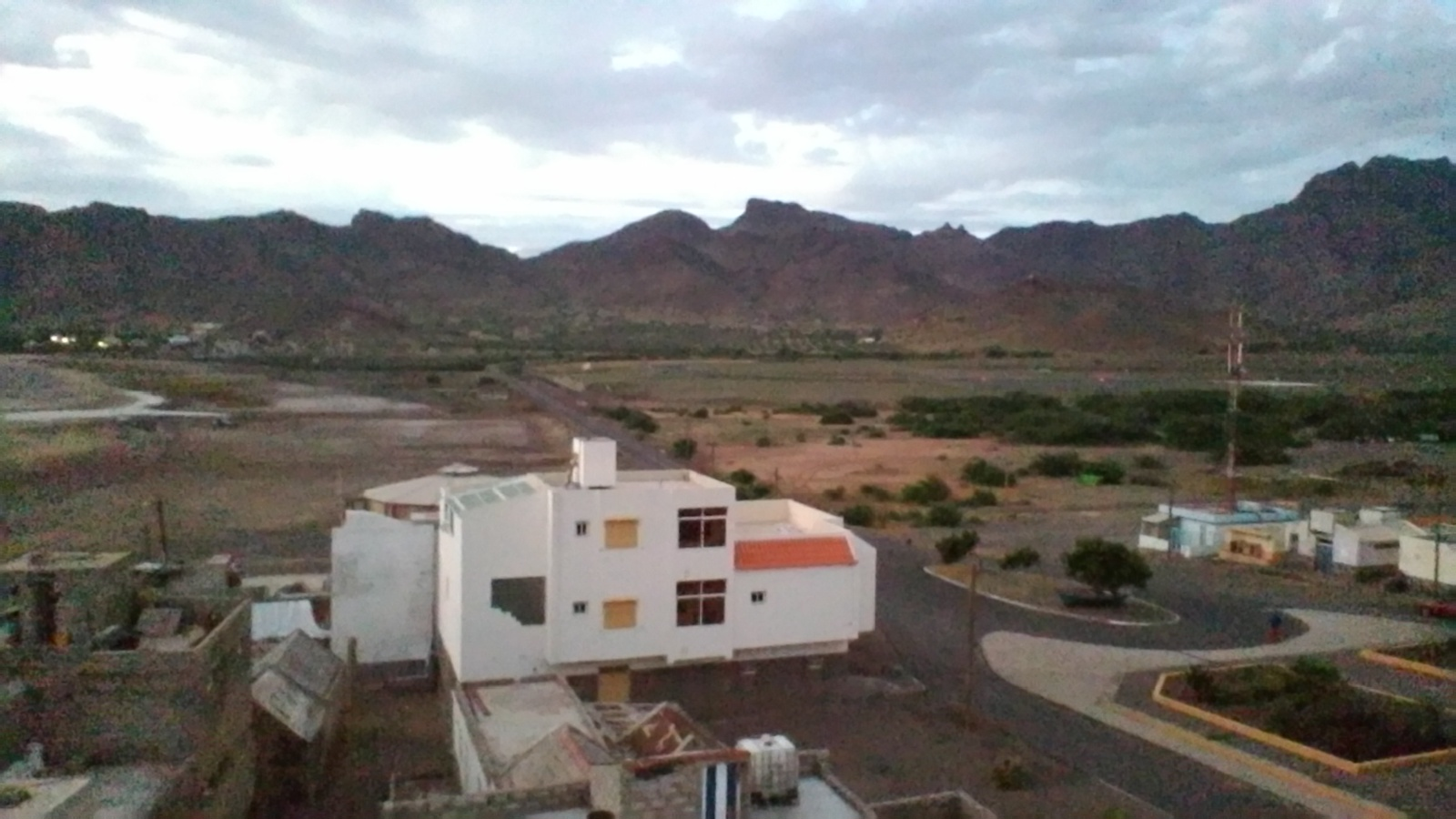 Vista su S.Pedro (periferia della città di mindelo)